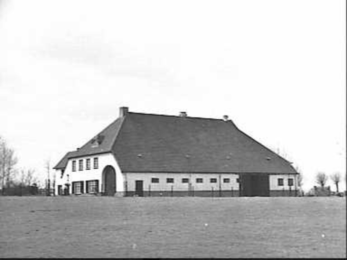 Zuid Limburg/ Boerderijen: voor- en zijgevel nr. L 5674 (opmerking: Deze afbeelding hebben wij helaas alleen in deze lage resolutie.)